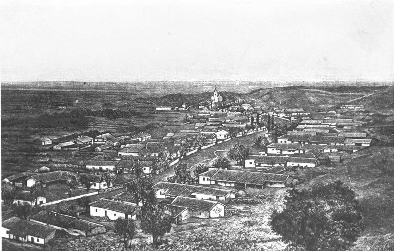 Цюрихталь — швейцарское сельо в Крыму